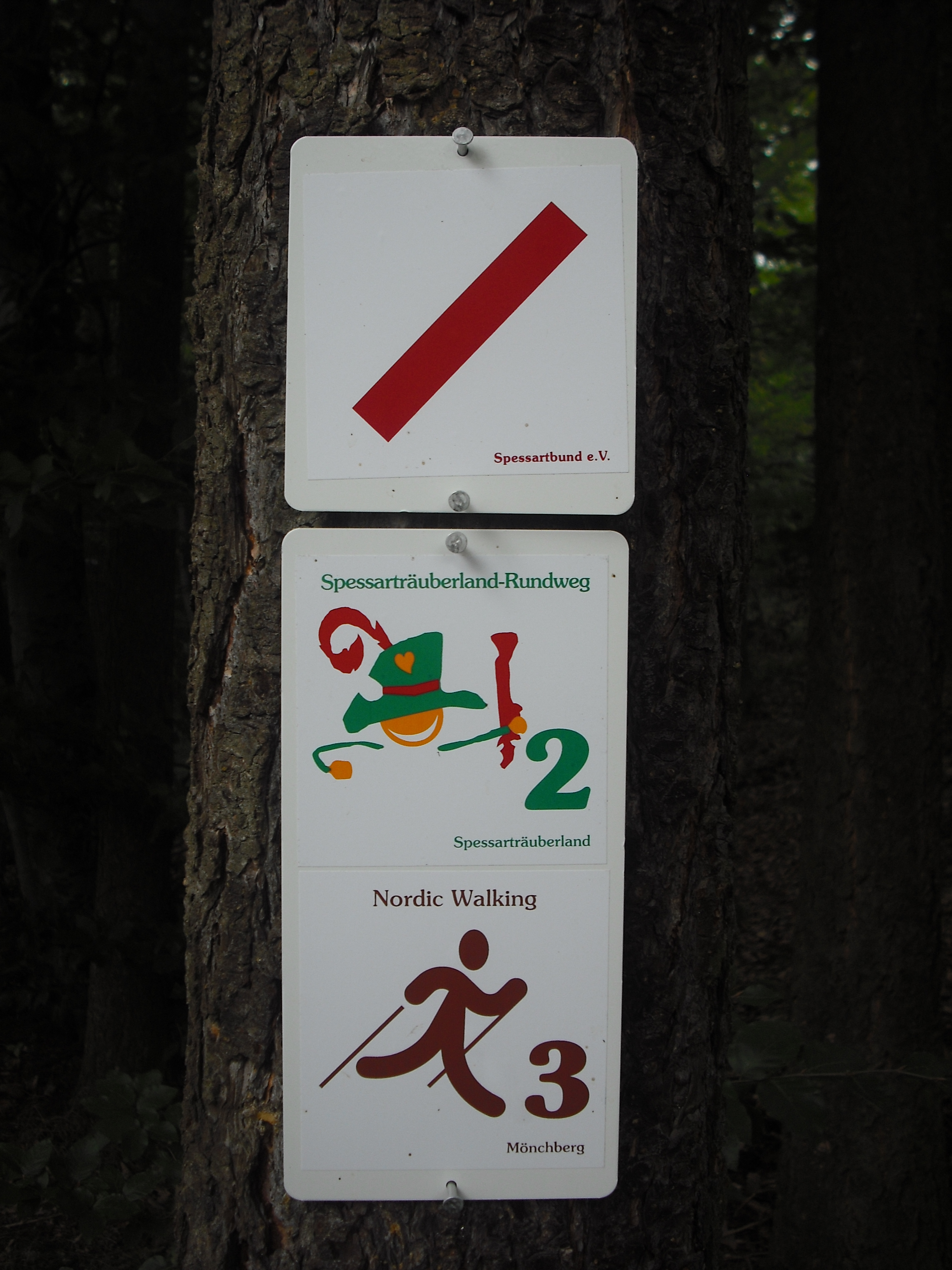 Wanderwegsmarkierung im Naturpark Spessart